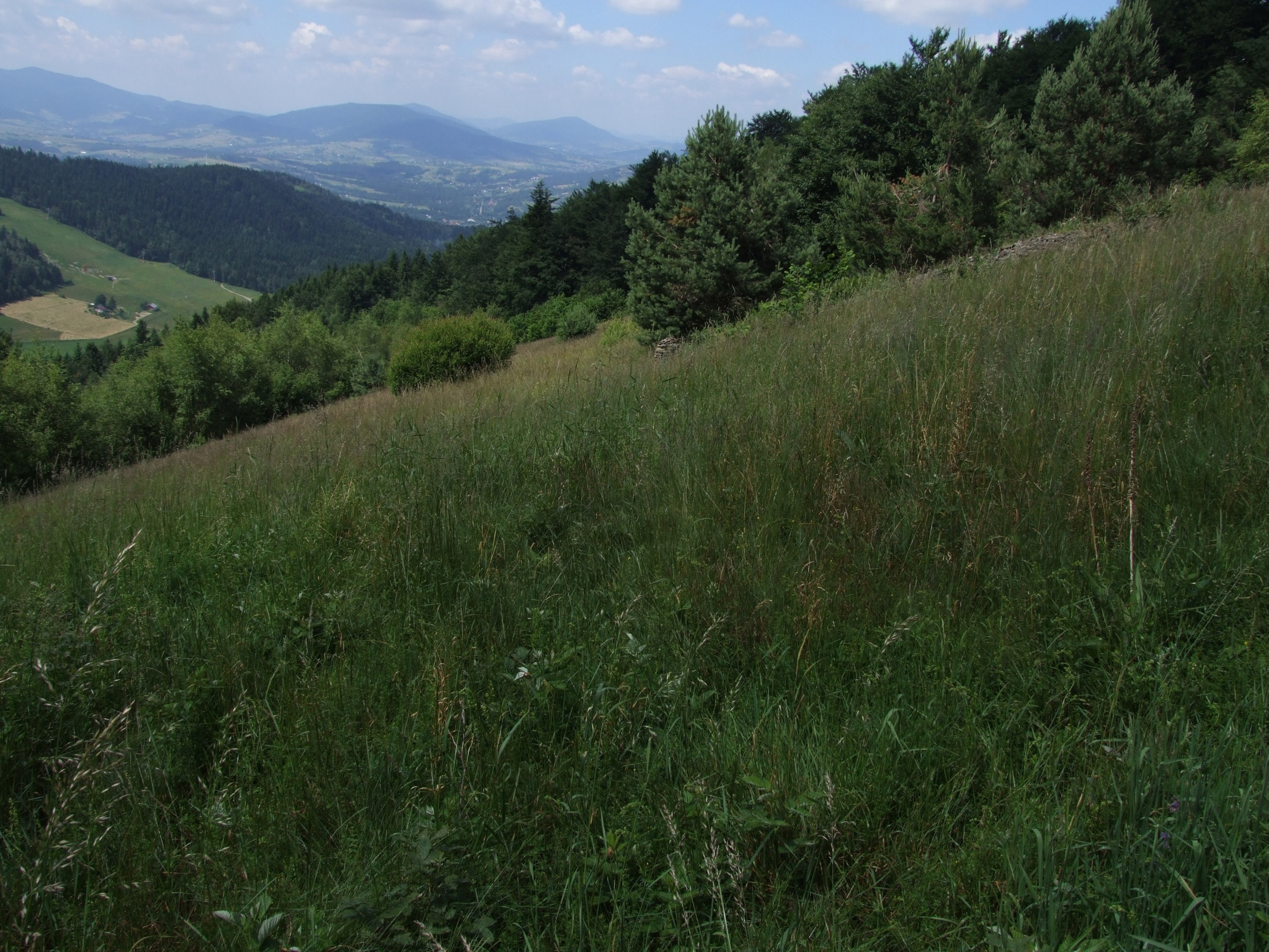 Polana Stoły na Sałaszu Zachodnim i widok na południową stronę. W oddali widoczny Łopień i Ćwilin